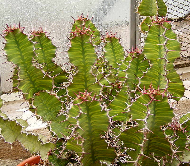 Euphorbia grandialata GB Heidelberg, Germany